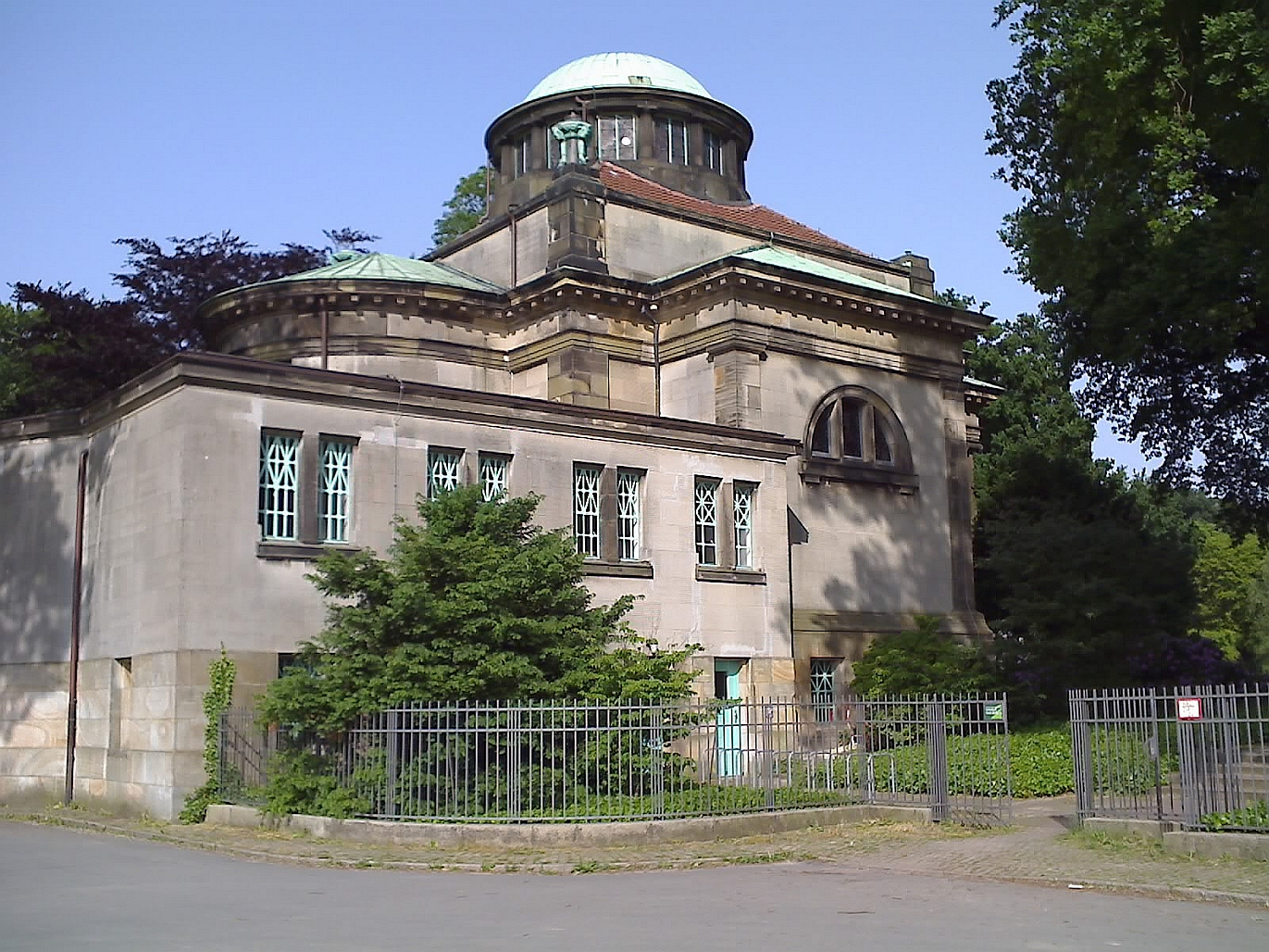 Krematorium Riensberg in Bremen, Friedhofstraße 51. Das abgebildete Objekt ist ein geschütztes Kulturdenkmal in der Freien Hansestadt Bremen, mit der Nr. 0418 beim Landesamt für Denkmalpflege registriert.